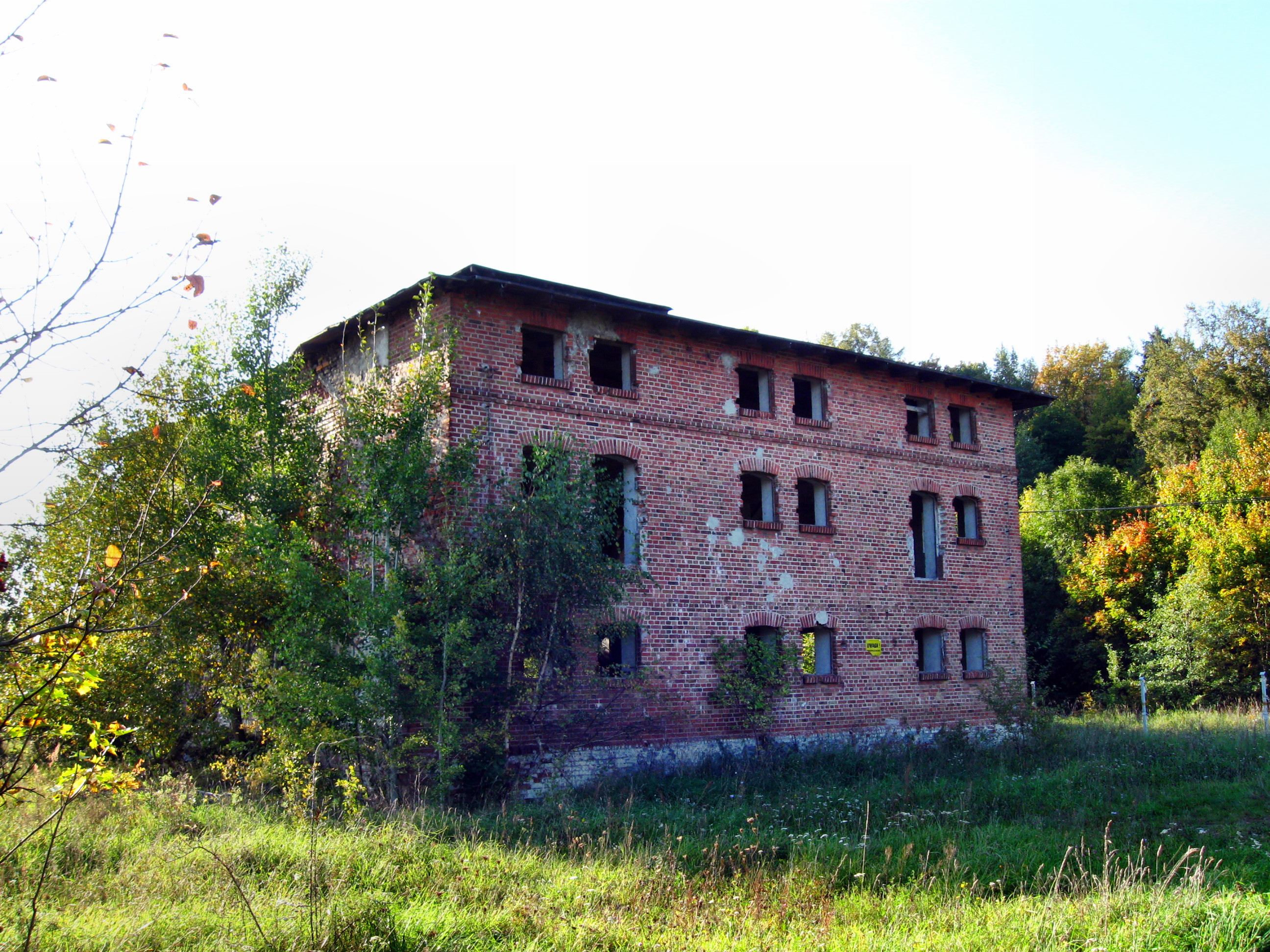 Bielkowo, powiat gdański - ruina w zespole folwarcznym